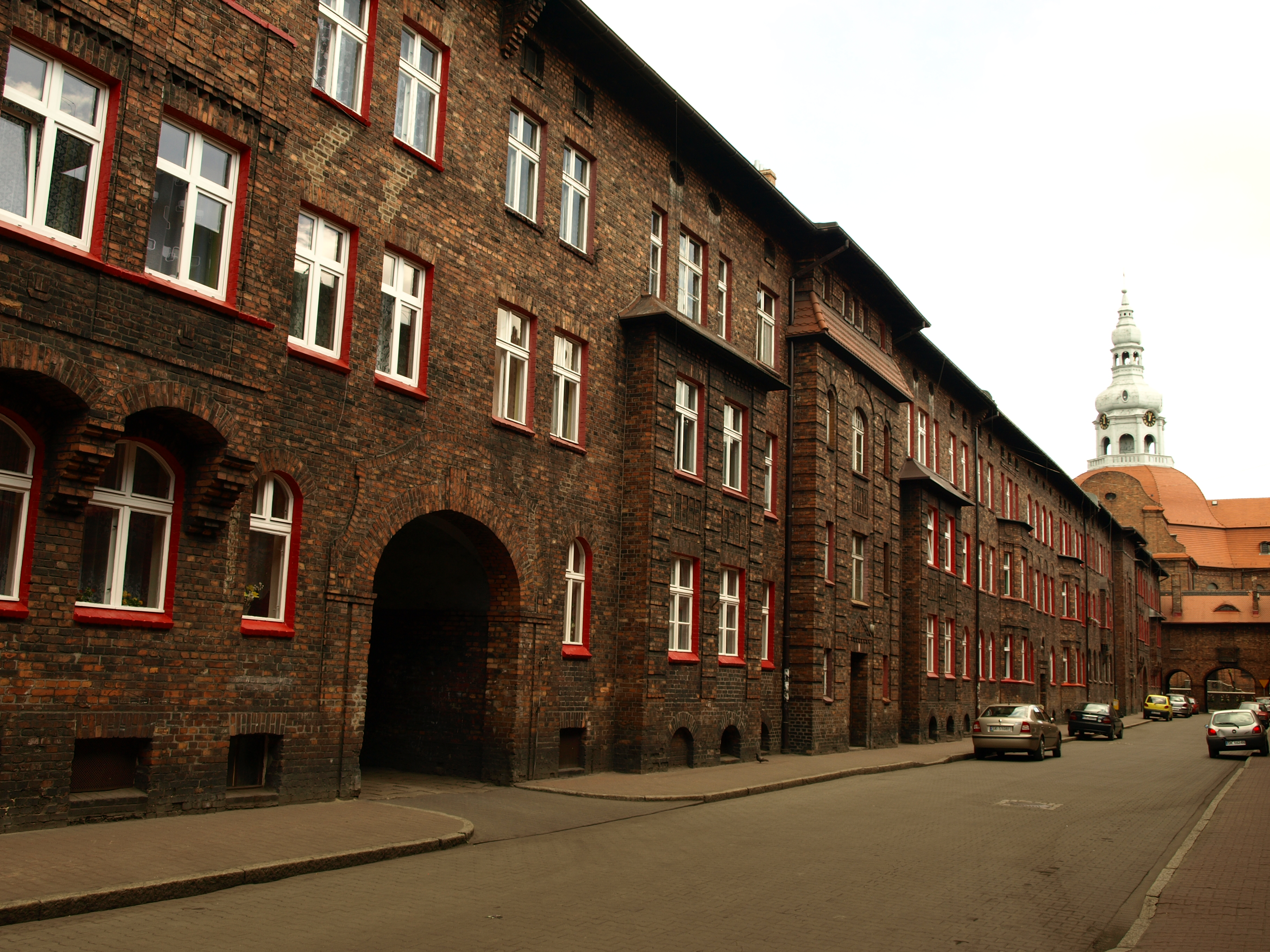 Ulica Św. Anny na Nikiszowcu (Zabytkowe osiedle robotnicze z lat 1908-1918, obejmujące ulice: księdza Ficka, Giszowiecka, Odrowążów, Czechowa, Janowska, świętej Anny, Garbarska, Rymarska, Nałkowskiej, Szopienicka, Plac Wyzwolenia) Katowice, Nikiszowiec, Katowice